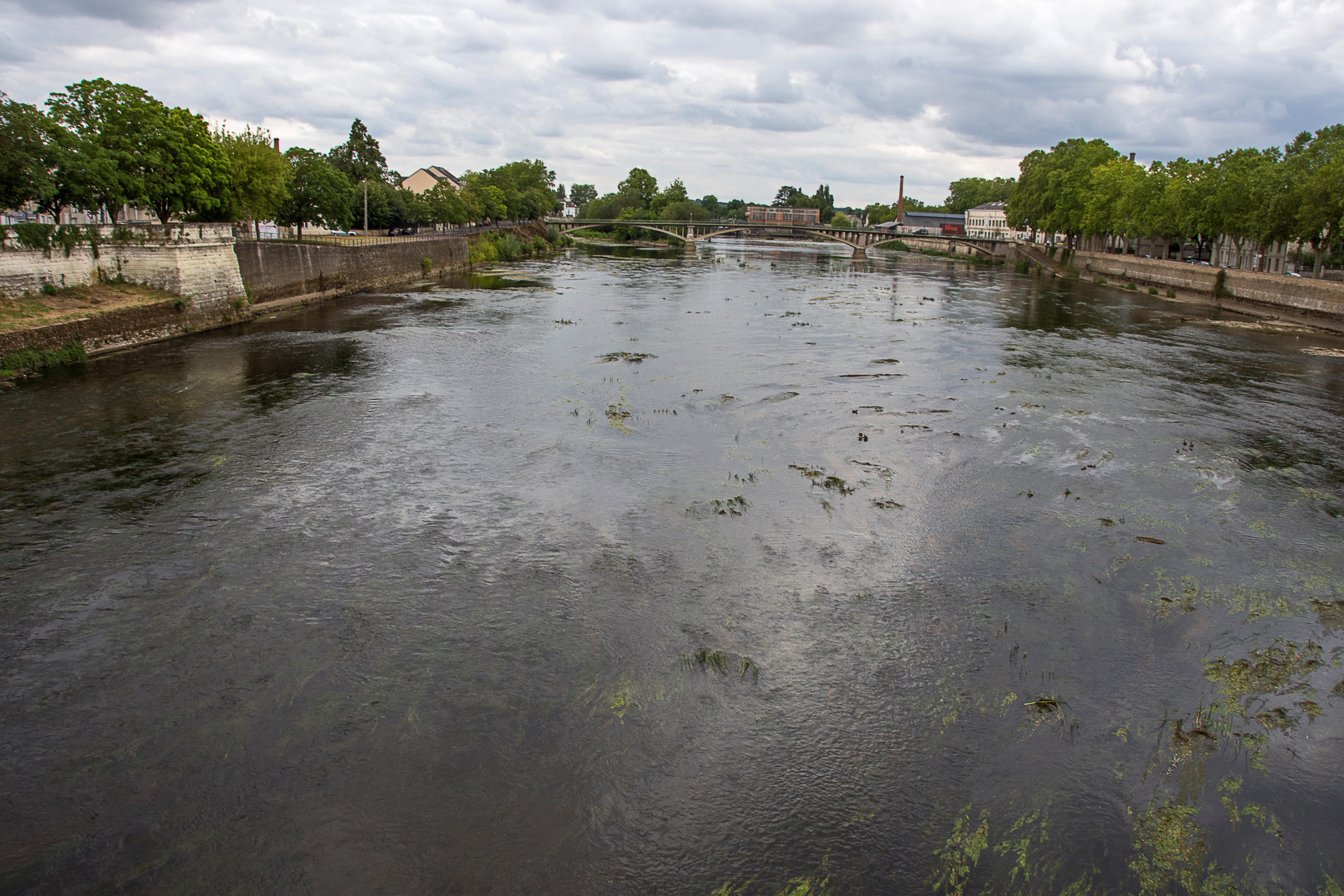 El río Vienne a su paso por Chateullerault.